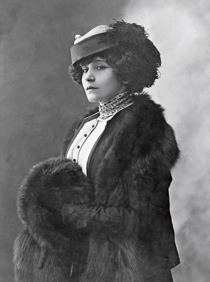 Colette photographiée par Henri Manuel.